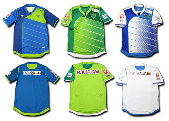 13/14シーズン ユニフォーム。右側面に300人を超えるサポーターの名前がデザインされている。